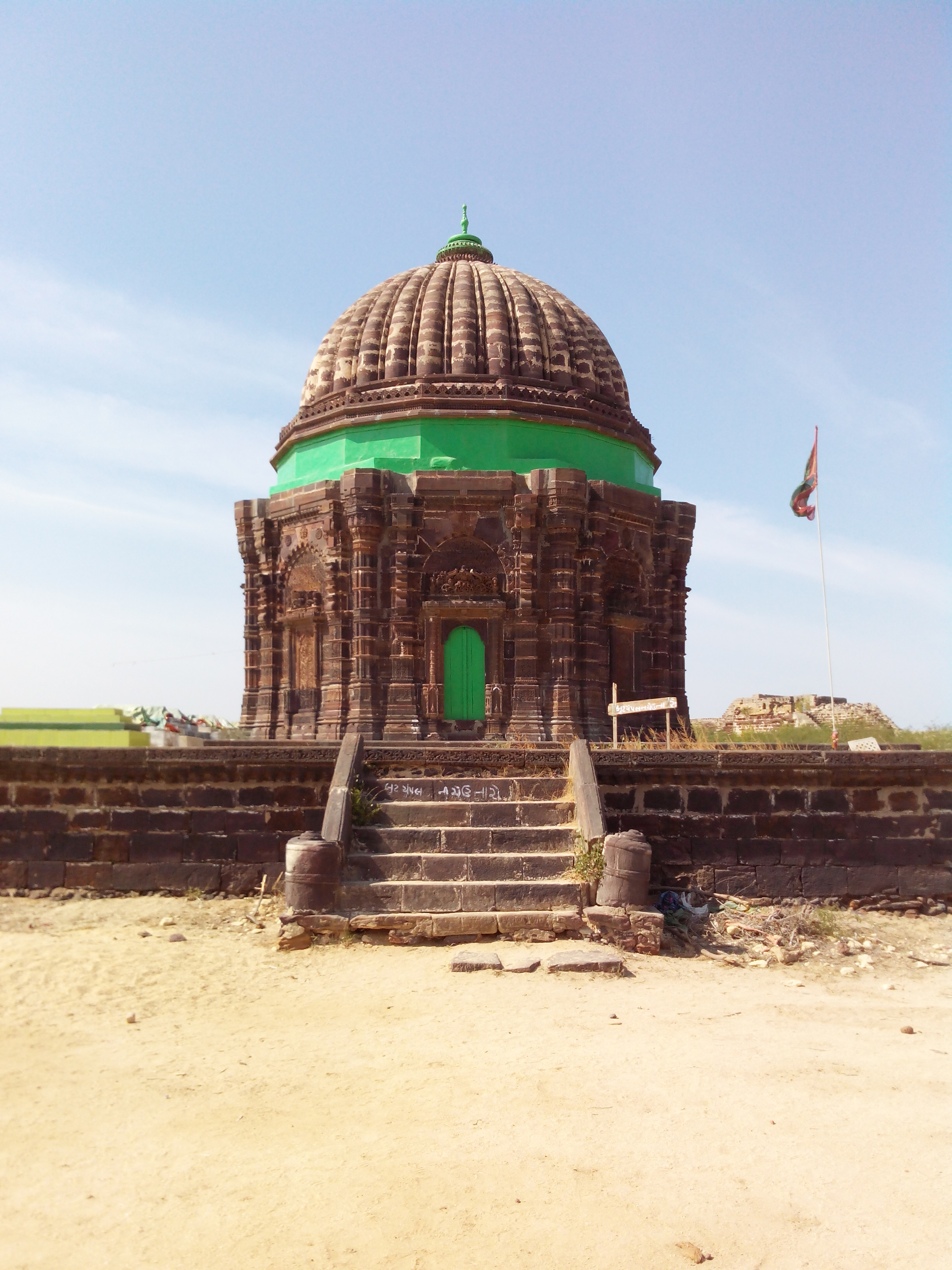 Pir Mohammed Kubo tomb at Lakhpat, Kutch, Gujarat, India